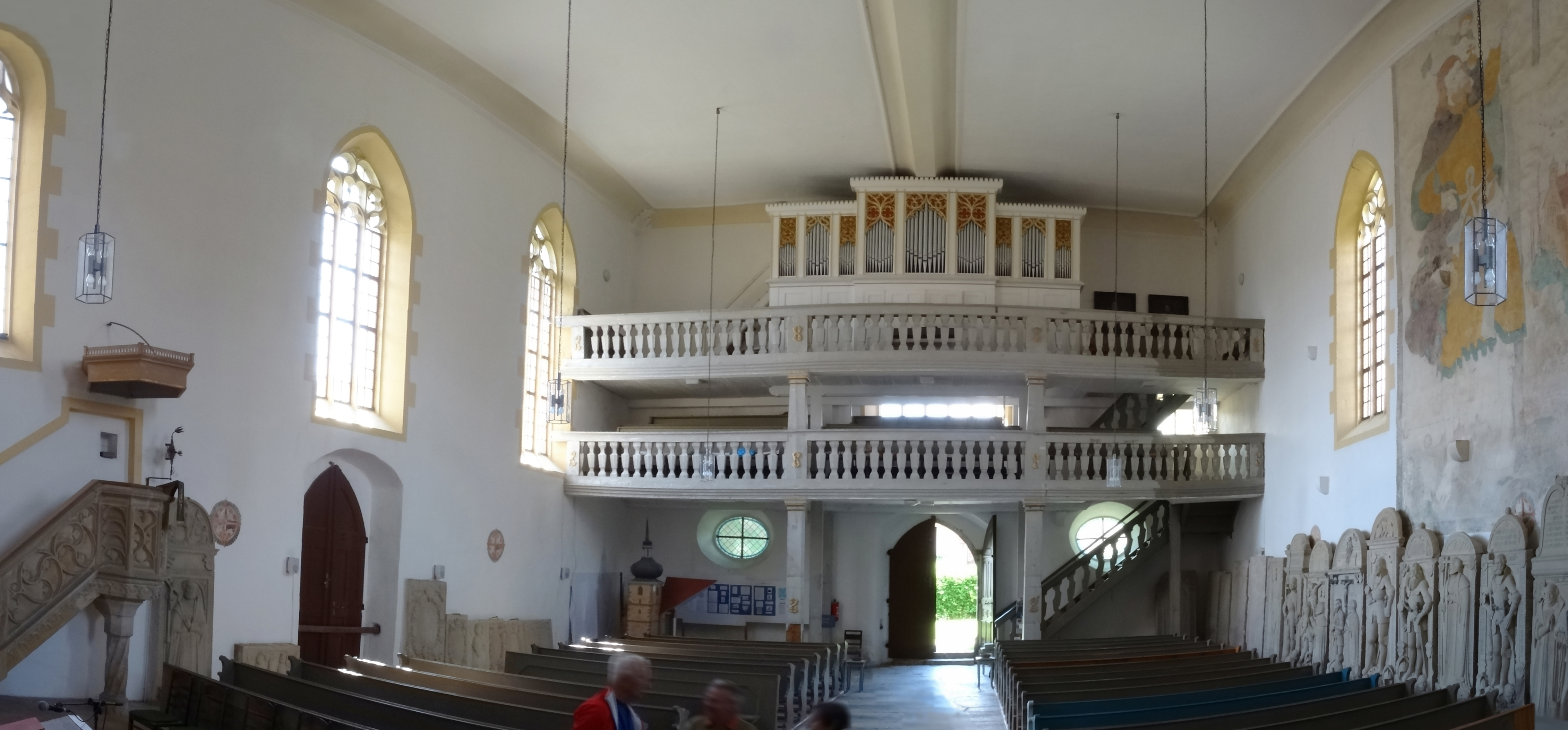 Innenraumpanorama der St.-Leo-Kirche zu Bibra mit dem Wandbild des Christophorus